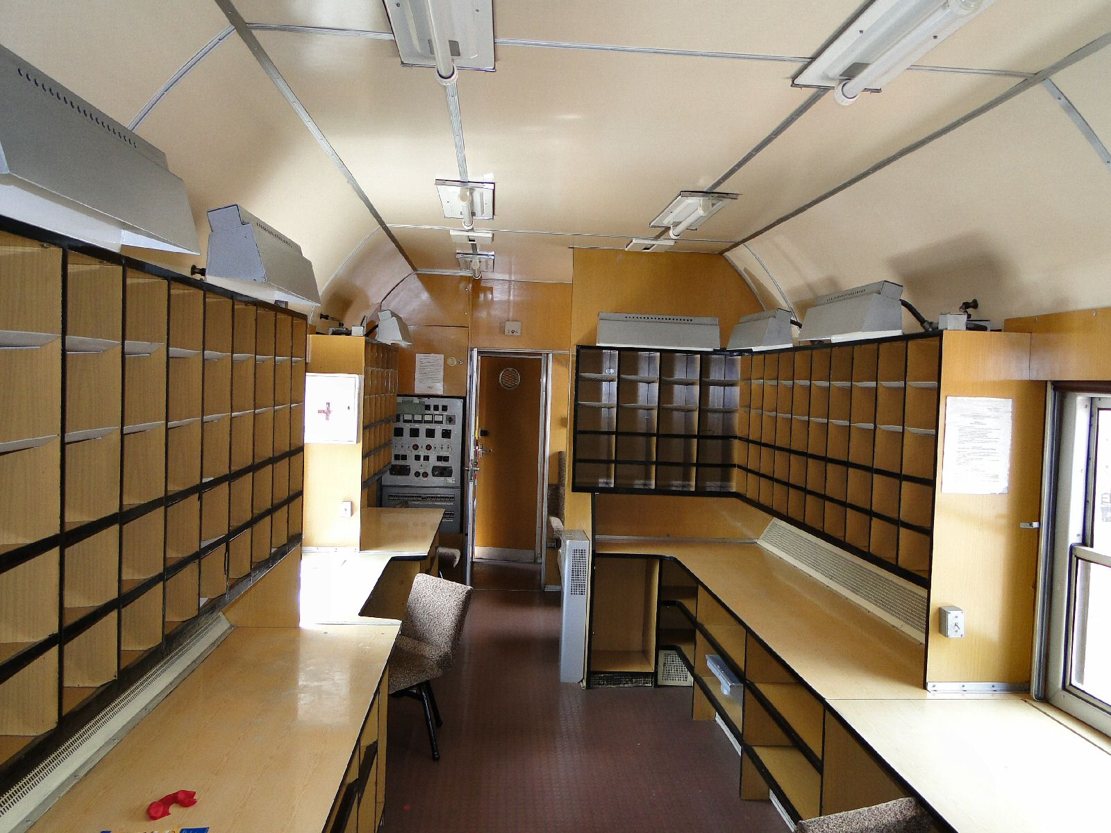 Wnętrze wagonu pocztowego PKP (pomieszczenie sortowni)